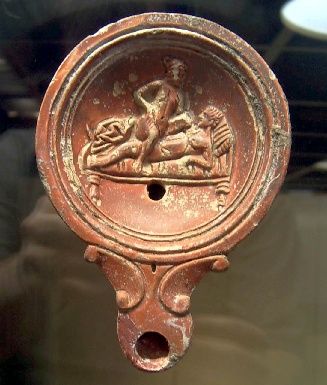 Öllampe mit erotischem Motiv im Römisch-Germanischen Museum Köln